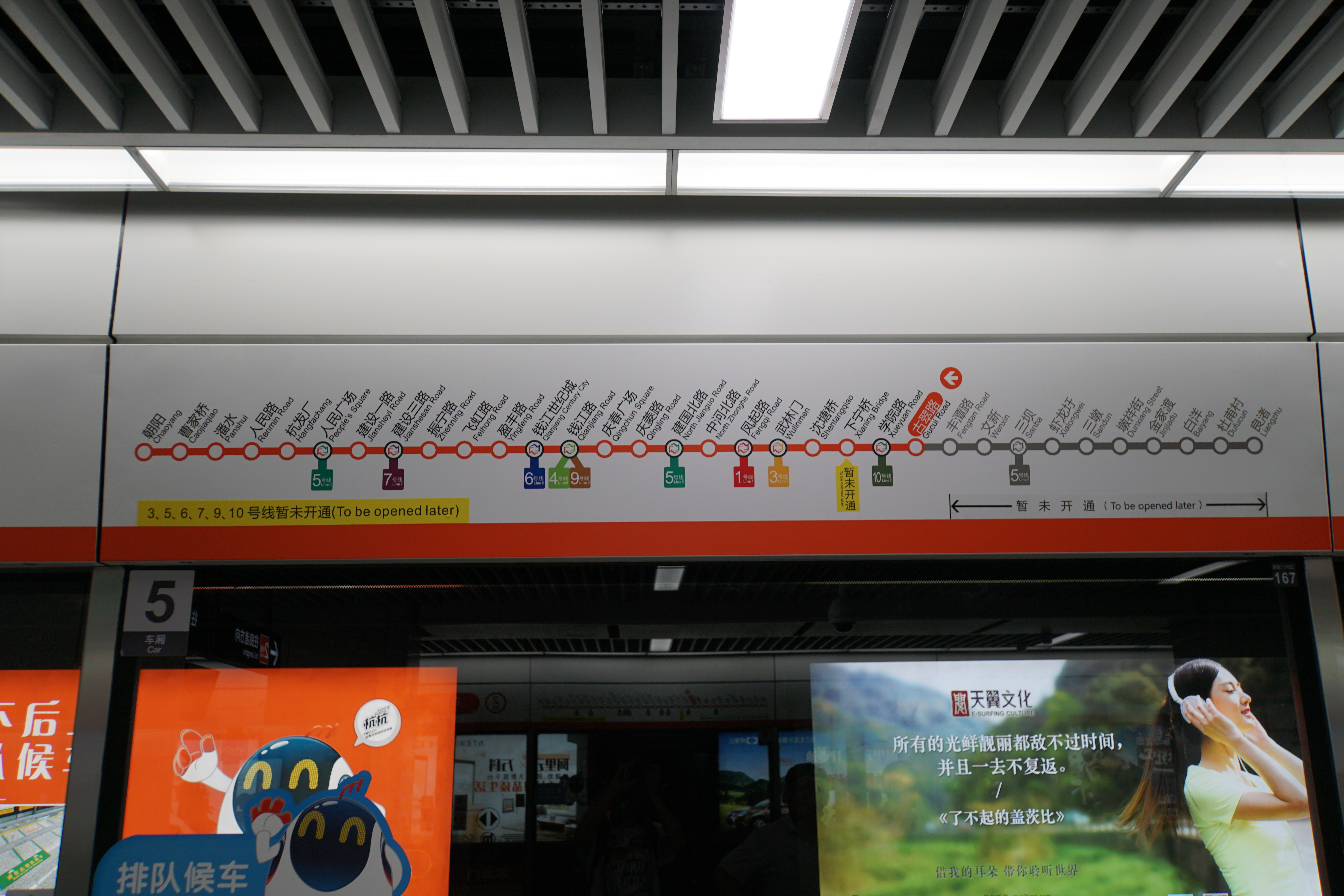 杭州地铁2号线站名表